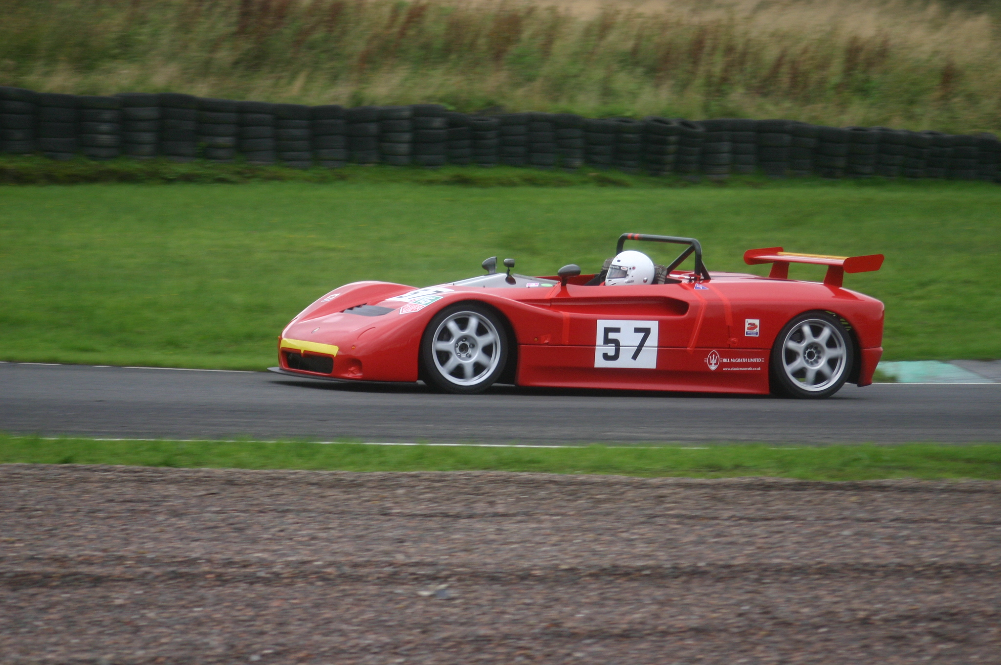 Maserati